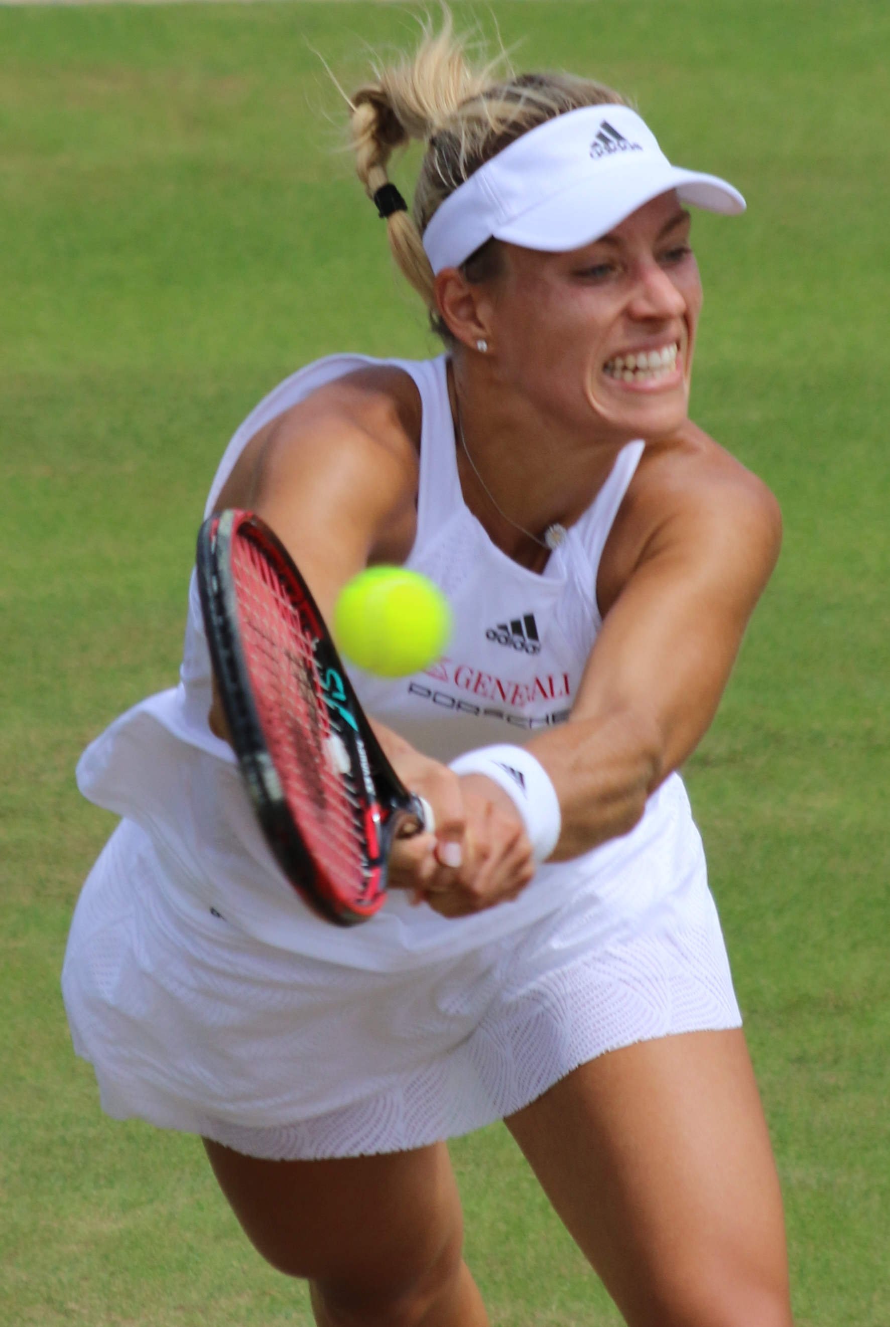 Kerber WM17 (27)